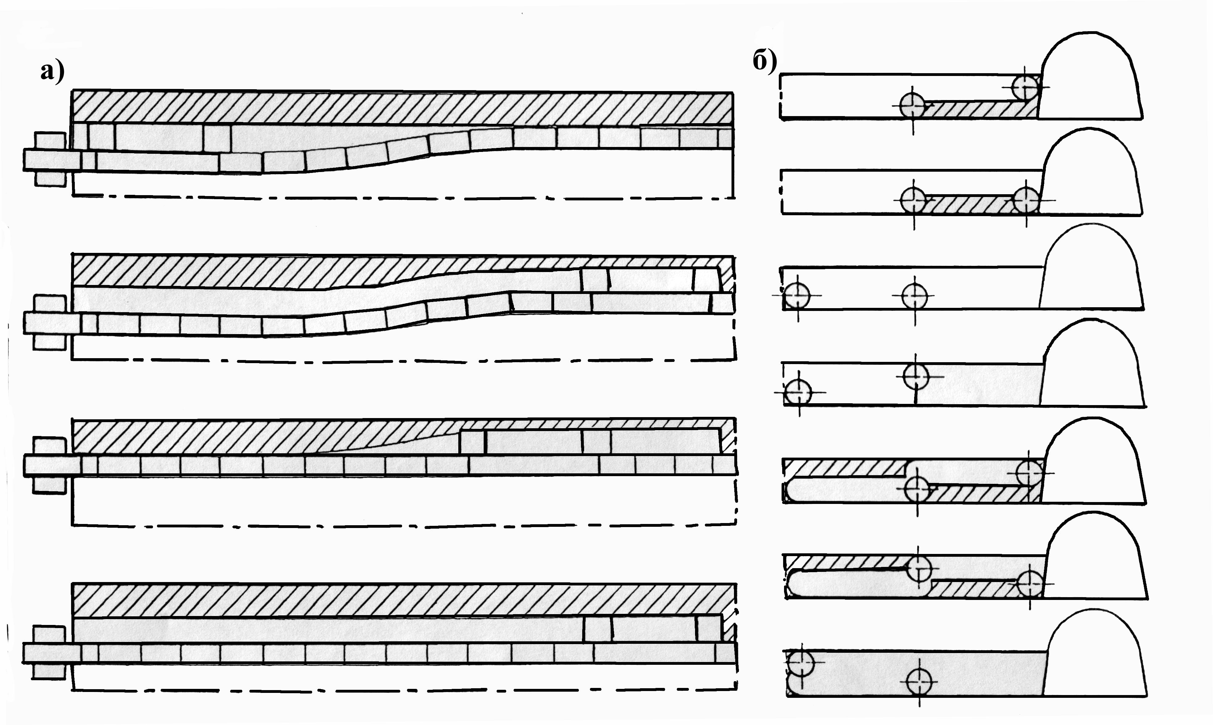 Схема